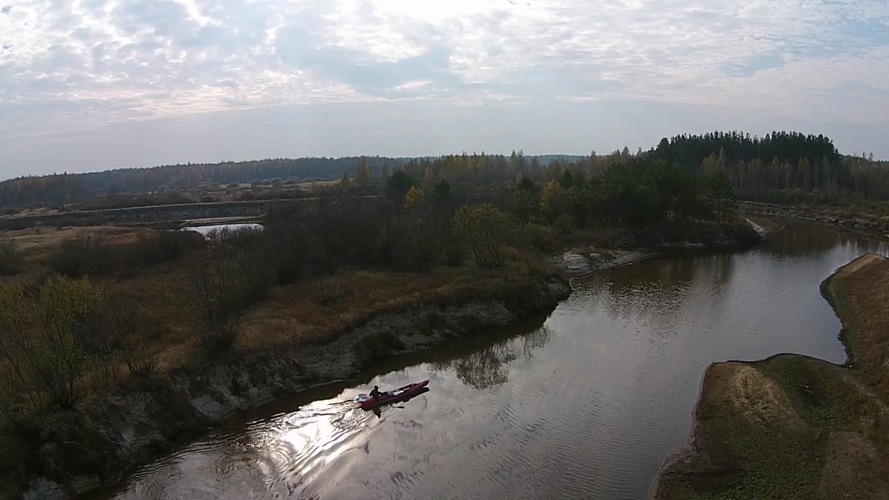 Байдарки на реке Пра